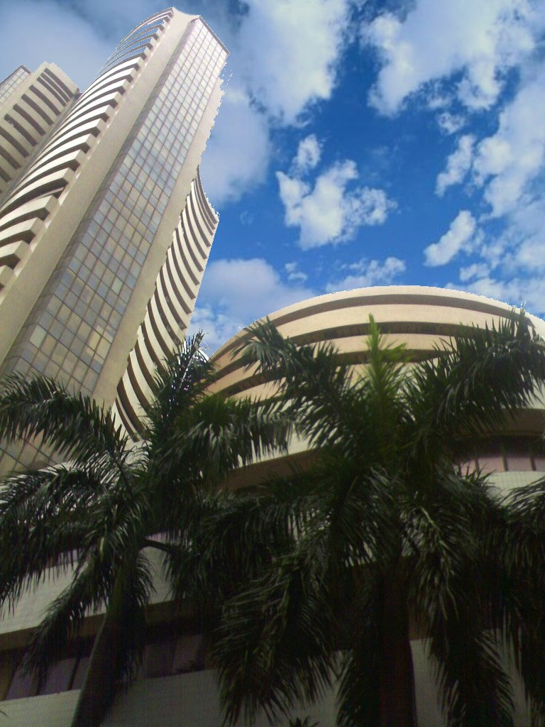 Bombay Stock Exchange